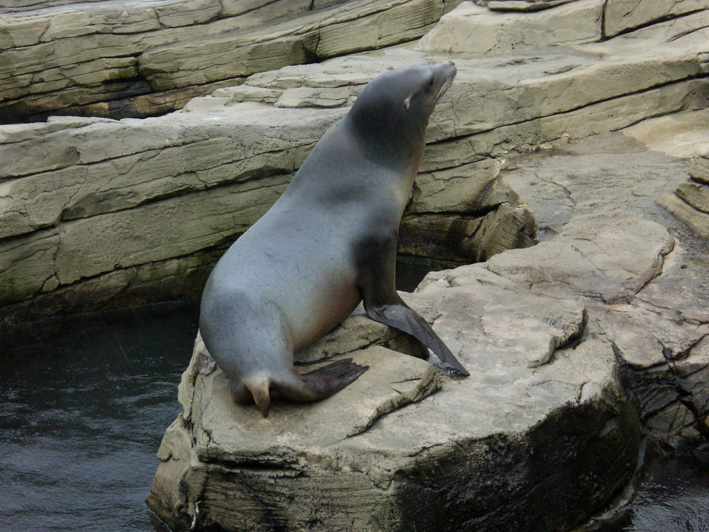 Photo d'une Otarie de Californie ou Lion de mer de Californie dans le Centre National de la Mer, à Boulogne-sur-mer (France).